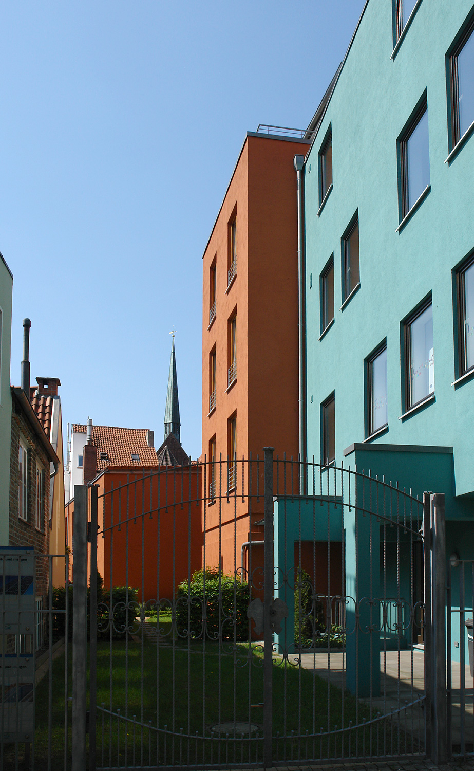 Birgittenkloster im Schnoor, Bremen. Im Hintergrund die Kirche St. Johann